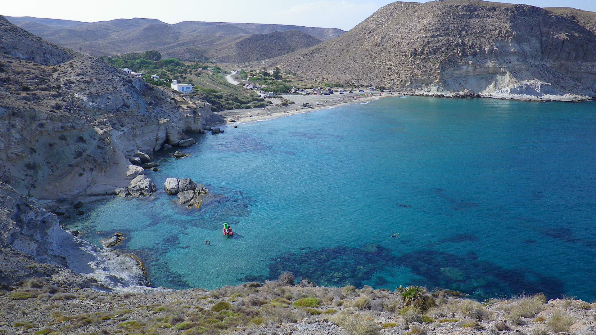 Vista general de la Cala del Plomo, rodeada de calizas y rocas de origen volcánico, la Rambla del Plomo que la precede y el Cortijo de la Huerta de Enmedio.